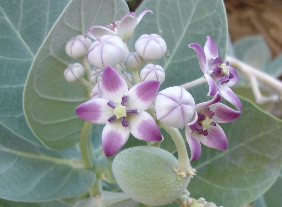 Calotropis procera, flora, Muscat, Oman